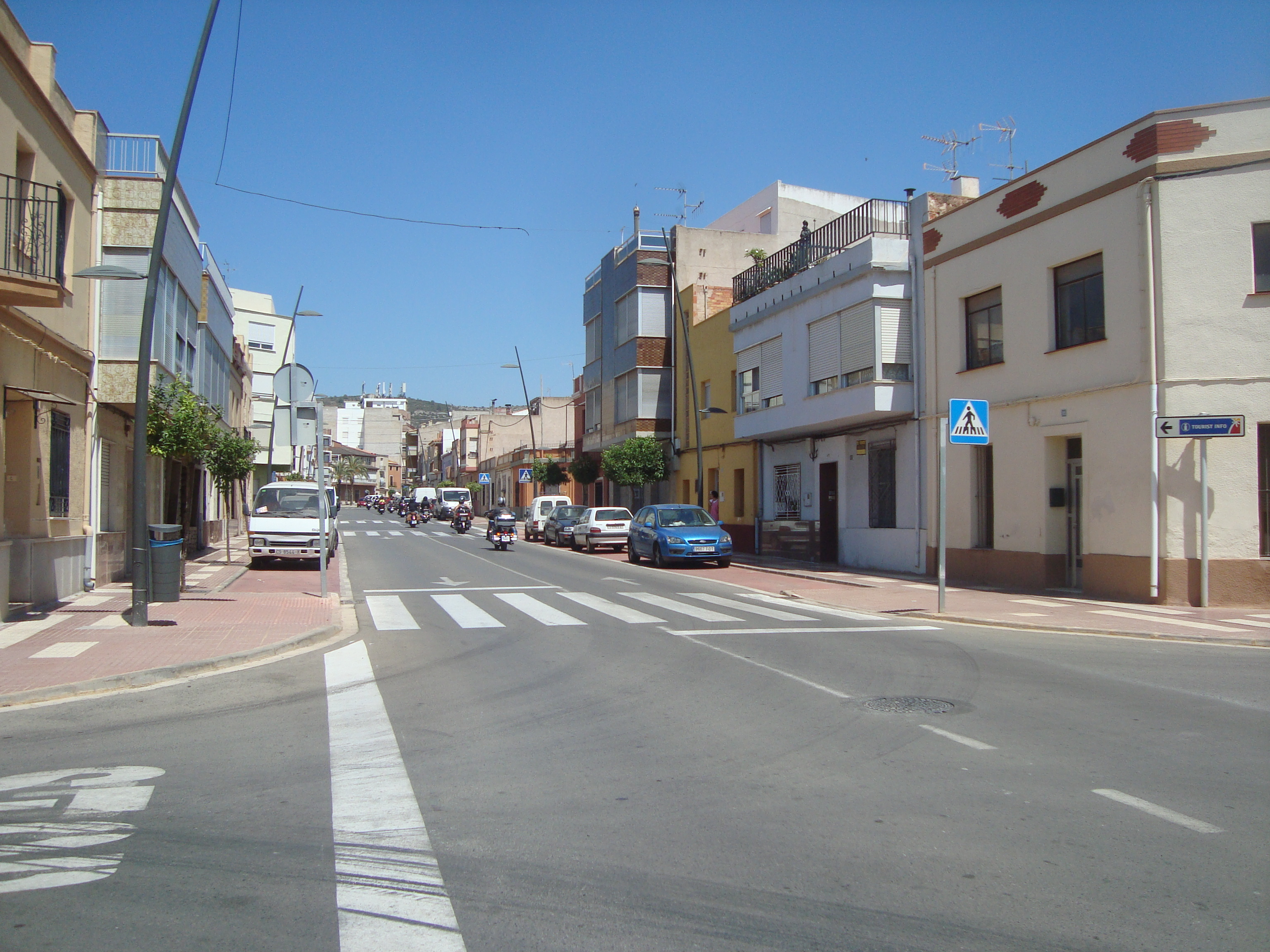 Торребланка (Кастельон)